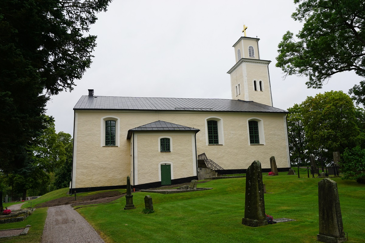 Björskogs kyrka, exteriör